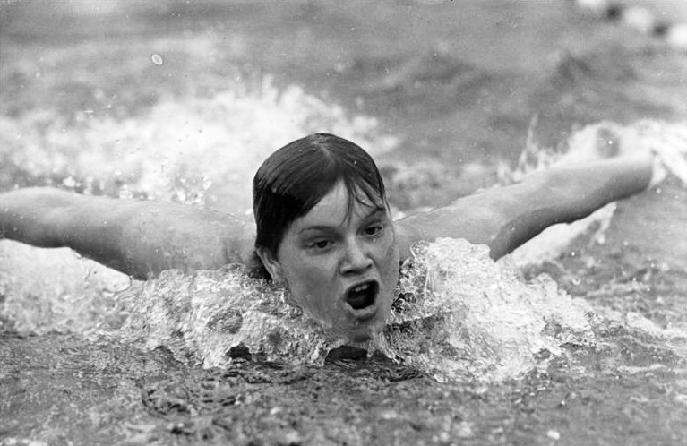 Helga Lindner Zentralbild Schaar Sche 17.8.1968 Leipzig: Deutsche Meisterschaften der DDR im Sportschwimmen-Meistertitel für Helga Lindner (16.8.) Am vierten Tag der Deutschen Schwimmsport-Meisterschaften folgte der dritte DDR-Rekord, geschwommen durch die Karl-Marx-Städterin Helga Lindner (SCK). Für die 200 Meter Delphin, vielleicht die kräftezehrendste Disziplin im Schwimmsport, benötigte sie 2:27,2 Minuten, ihren eigenen Rekord damit um 0,3 Sekunden unterbietend. In Europa nimmt sie damit hinter der Weltrekordlerin Ada Kok (Niederlande,2:21,0 Minuten) den zweiten Platz ein. Information added by Wikimedia users.Helga Lindner